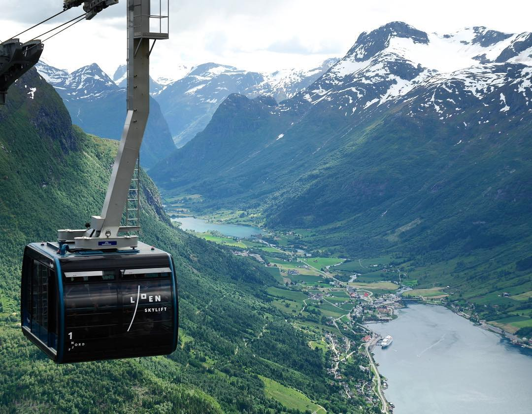 Loen Skylift, i Stryn, Nordfjord, Norge